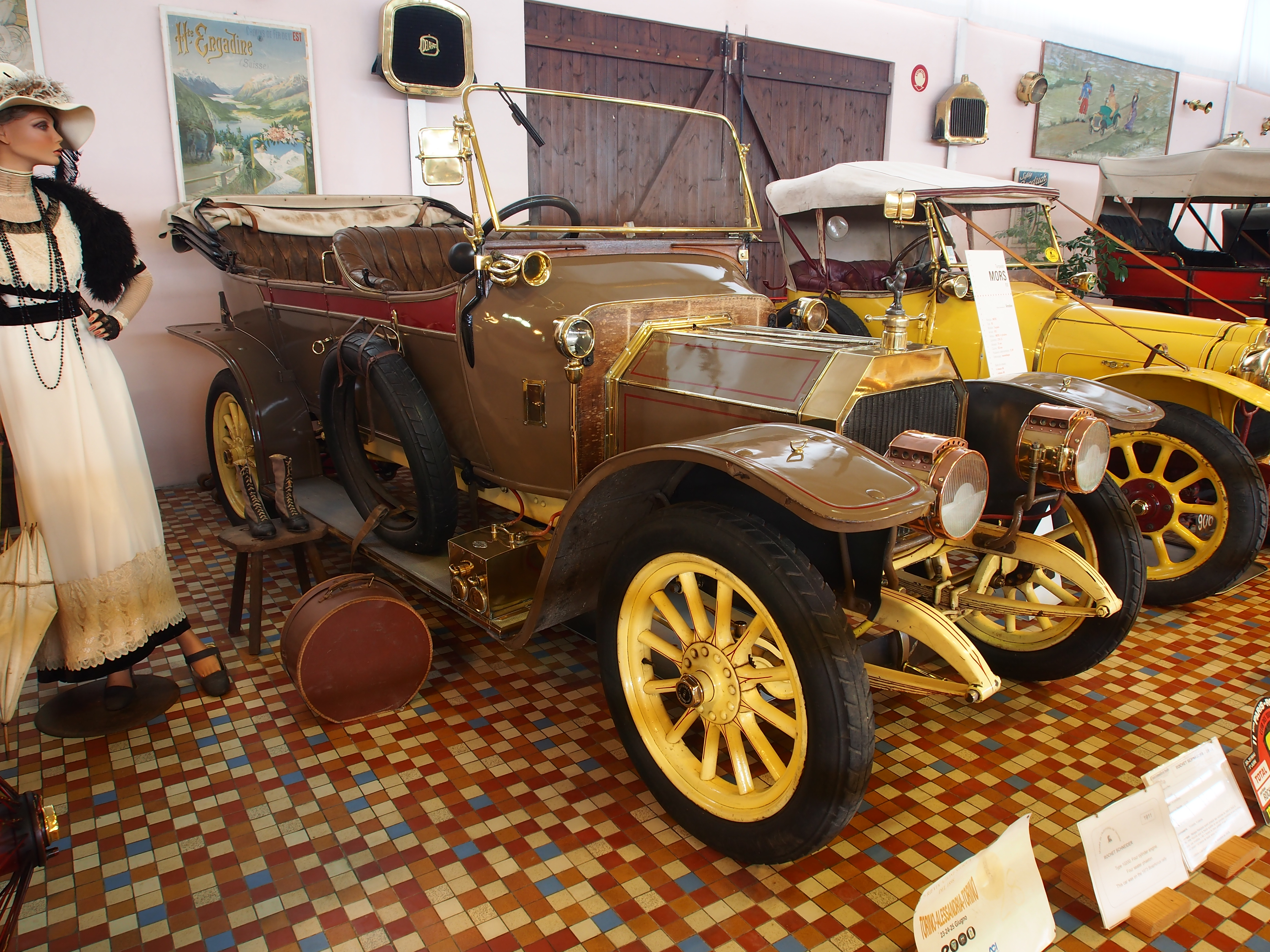 Photographed at the Musée Automobile de Vendée, France.